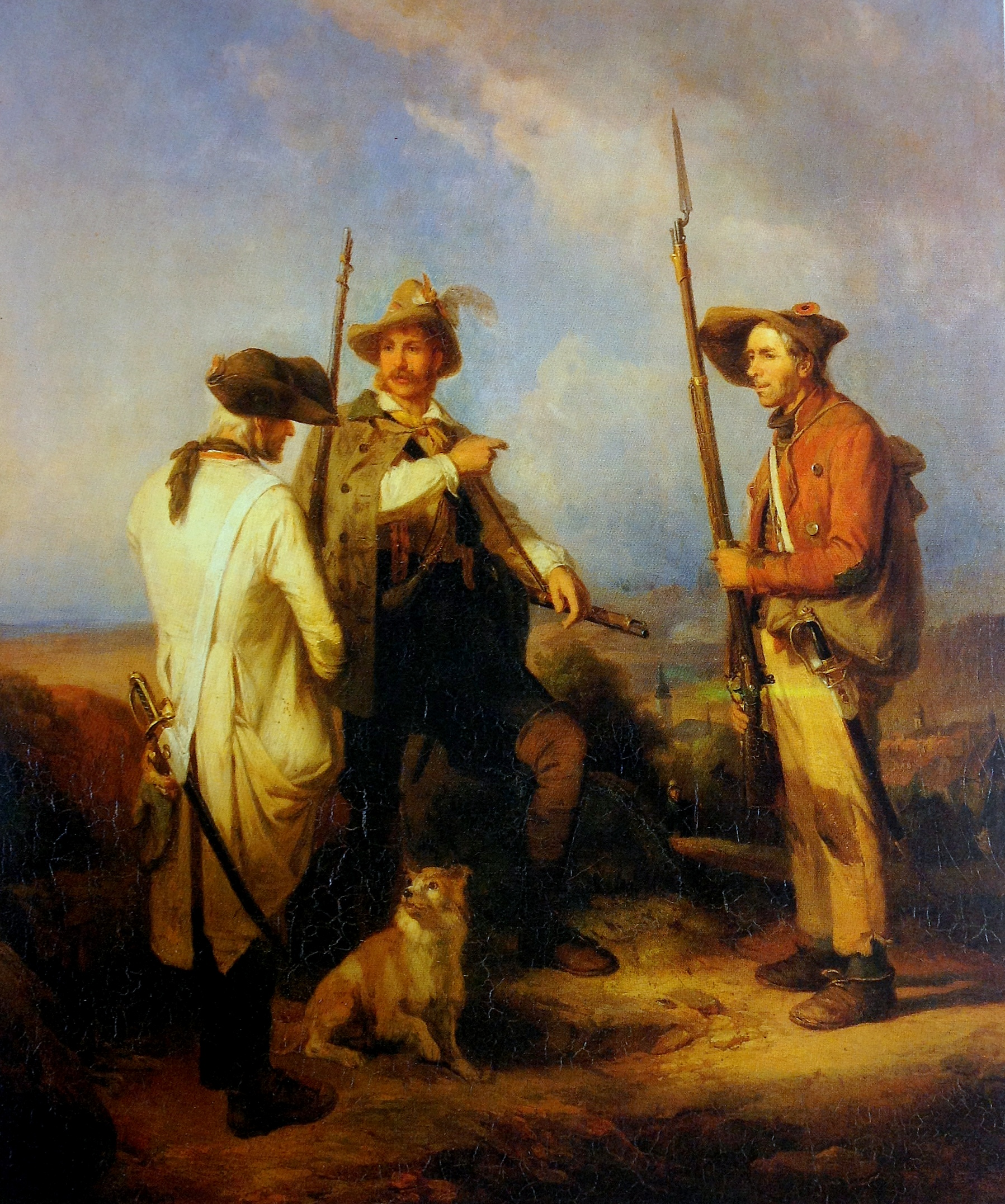 Öl auf Leinwand, Johann Baptist Kirner, 1849. “Badischer Freischärler mit zwei Ordonnanzen.”